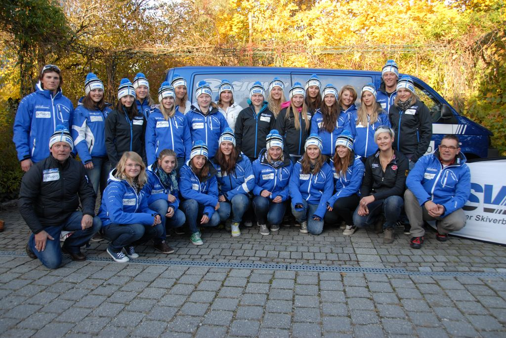 BSV Kaderathleten bei der BSV Einkleidung Saison 2010/2011